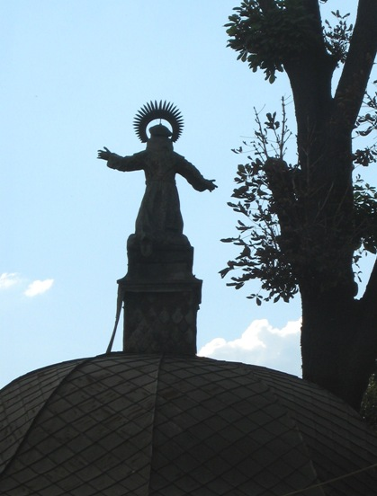 Ян з Дуклі. Статуя. Львів, Бернардинський монастир